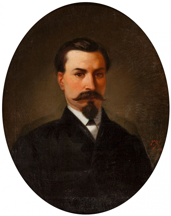 Retrat de Lorenzo Grenzner, germà del artista (1861) Oli sobre la tela Colecció Grenzner-Fellner, Barcelona